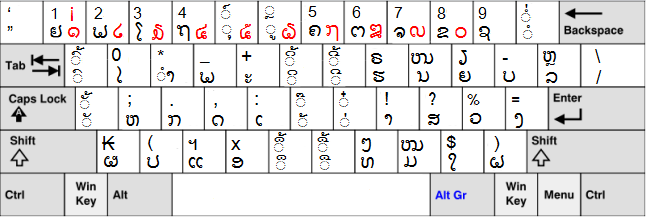 Windowsのラオ語キーボード